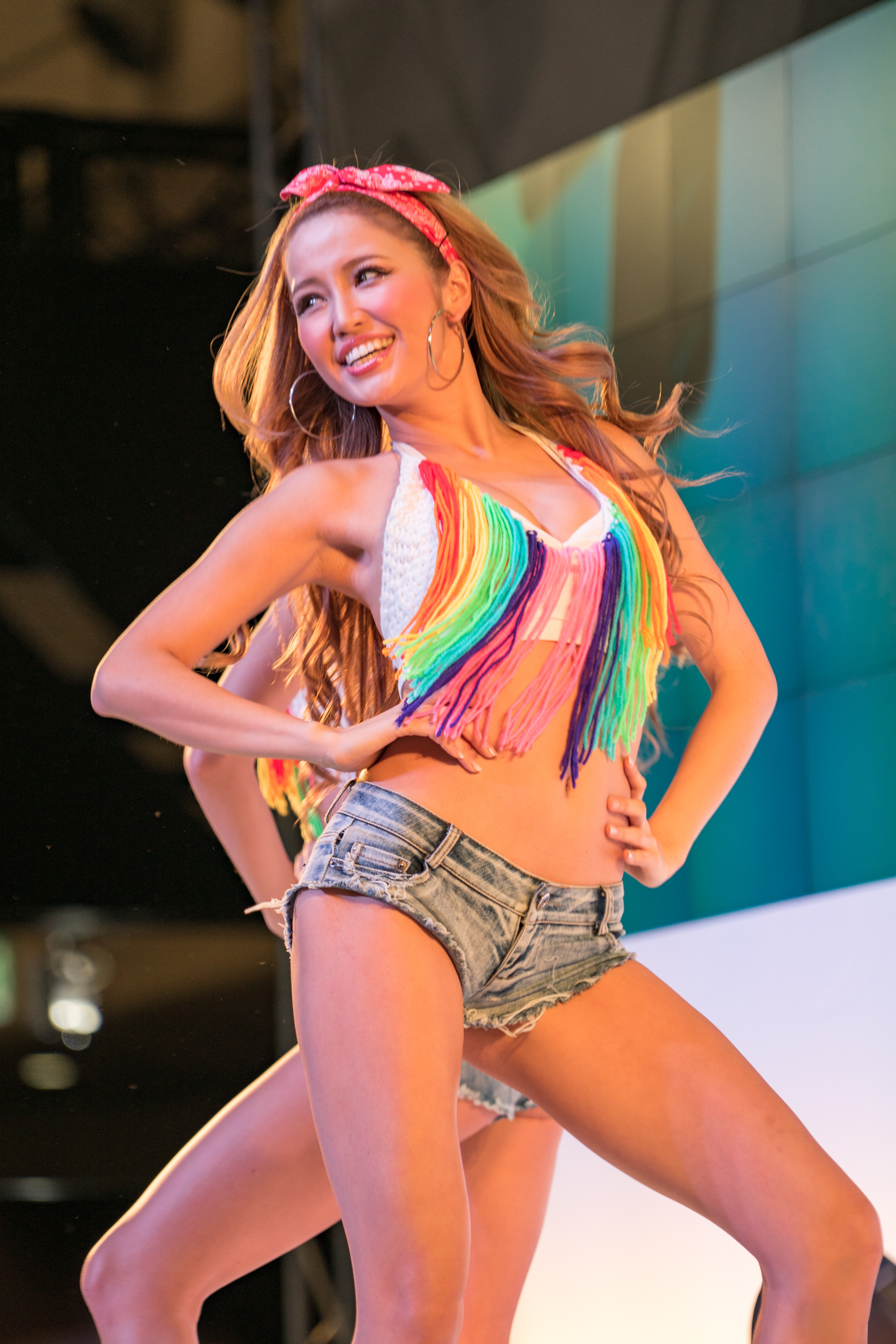 TOKYO AUTO SALON 2017 （東京オートサロン2017）-200.jpg